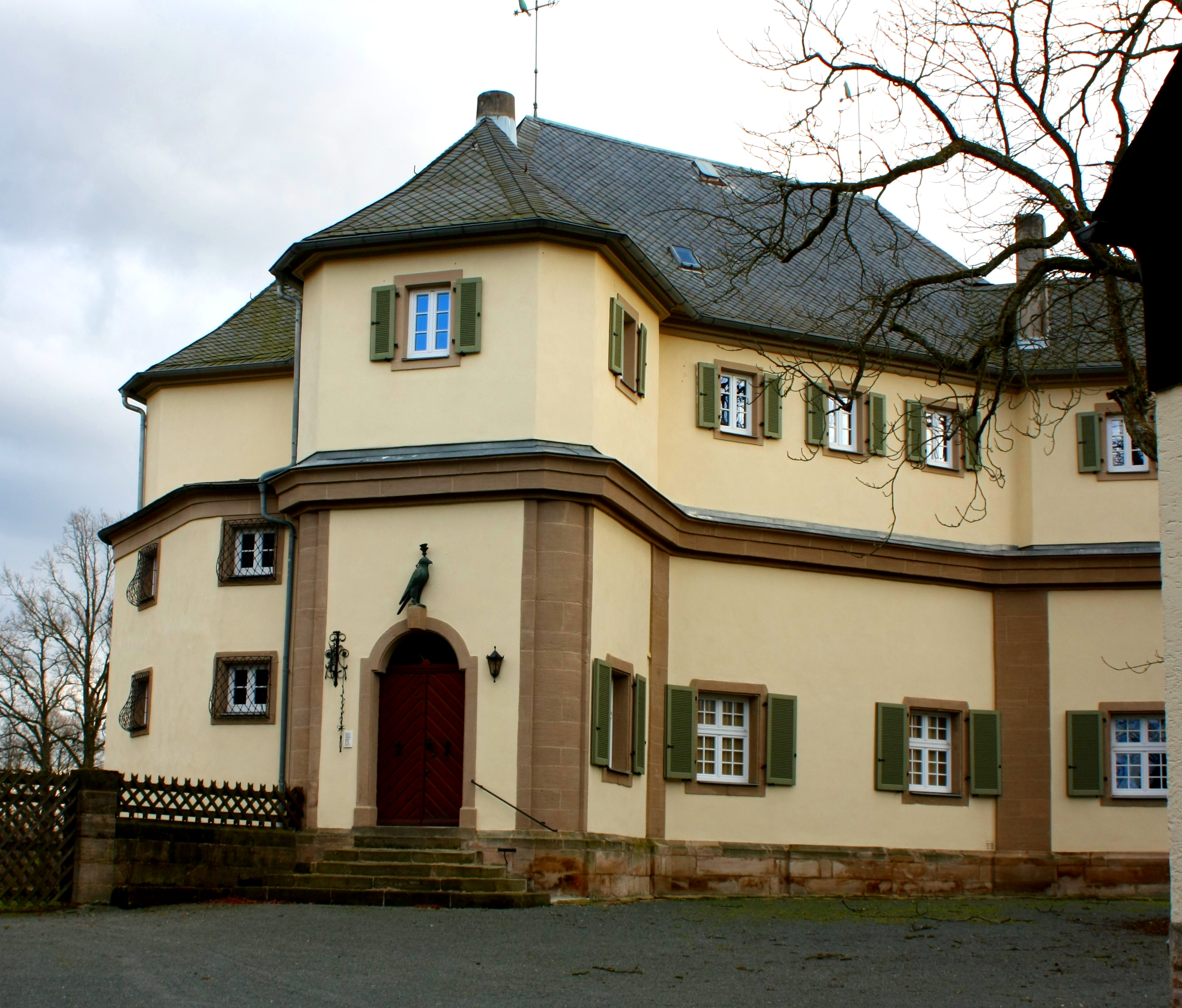 Schloss Falkenhaube Bad Berneck im Fichtelgebirge, erbaut von Georg Wilhelm (1678–1726), Markgraf von Brandenburg-Bayreuth